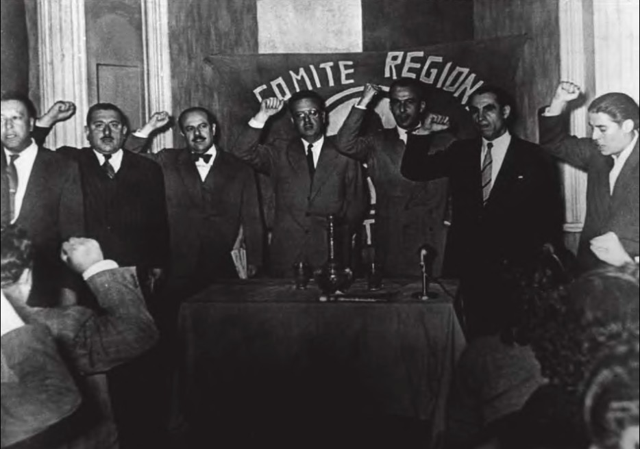 Proclamacion presidencial de Salvador Allende en las elecciones de 1952